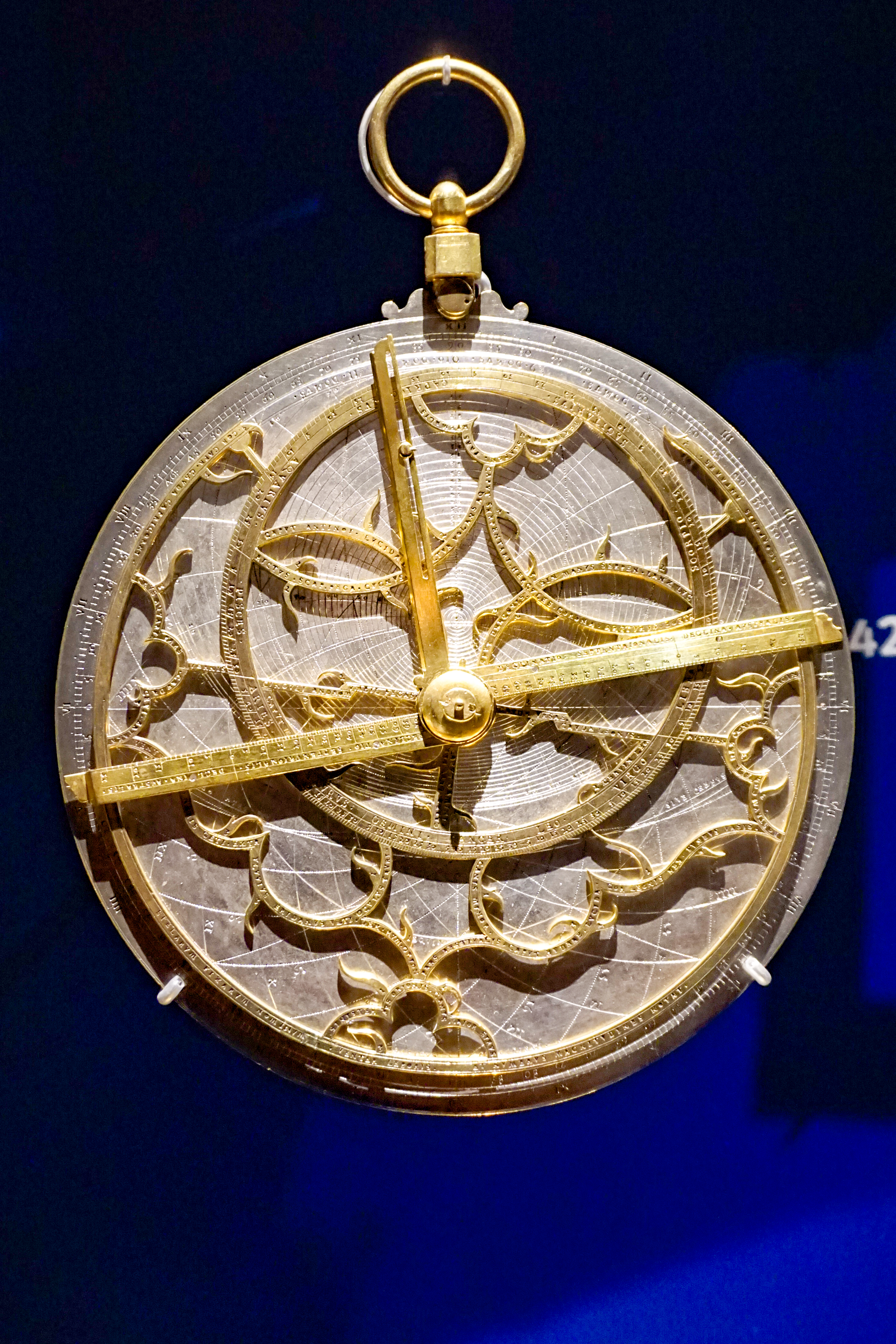 Kunstkammer im Landesmuseum Württemberg, Stuttgart: Astrolab, wohl Süddeutschland, Anfang 17. Jahrhundert